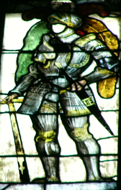 Ausschnitt aus dem Markgrafenfenster von St. Sebald in Nürnberg: Markgraf Georg der Fromme